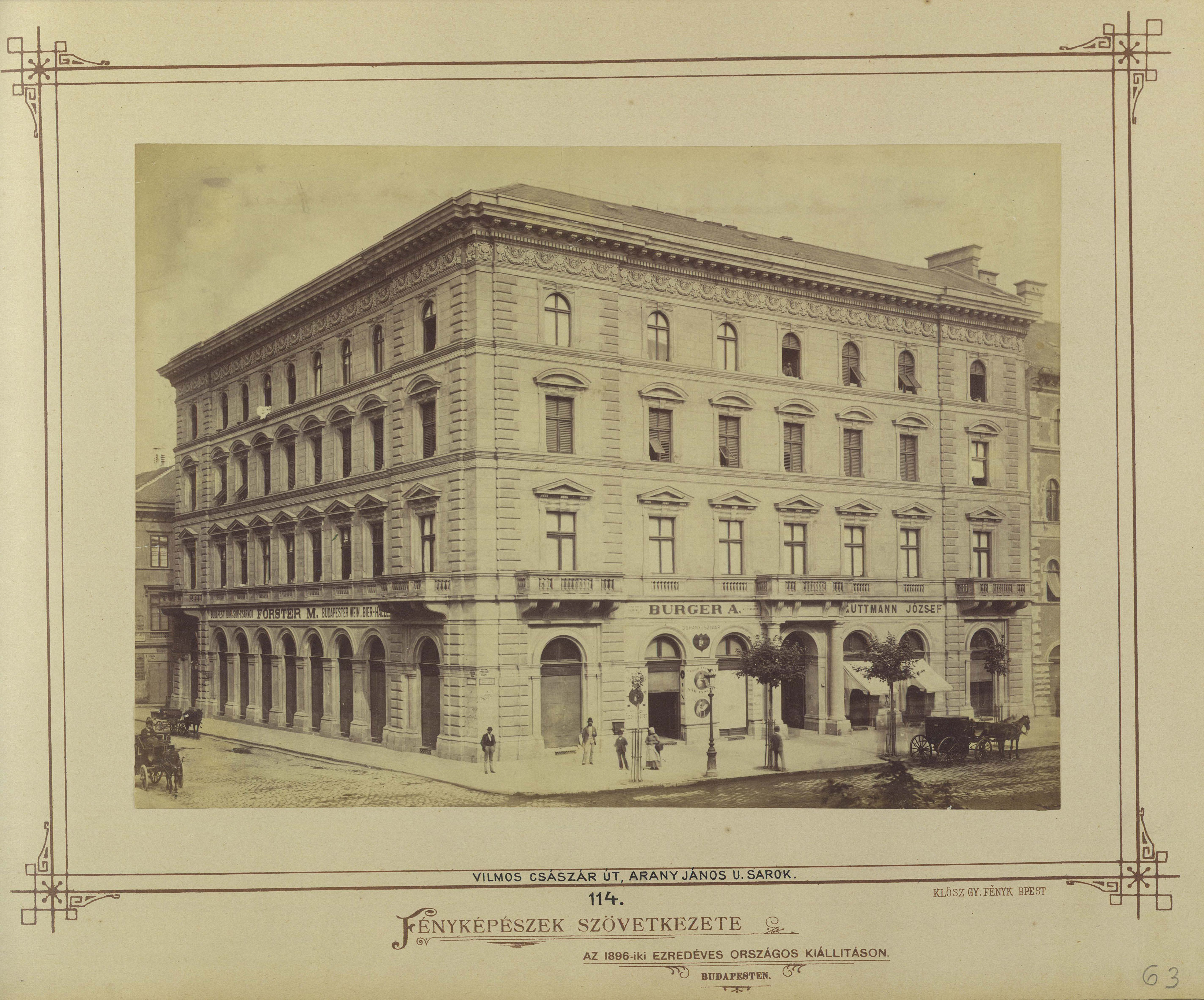 Bajcsy-Zsilinszky út (Váci körút), balra az Arany János utca. A felvétel 1880-1890 között készült. A kép forrását kérjük így adja meg: Fortepan / Budapest Főváros Levéltára. Levéltári jelzet: HU.BFL.XV.19.d.1.05.123 Location: Hungary, Budapest V. Tags: Budapest, cab-horse Title: Bajcsy-Zsilinszky út (Váci körút), balra az Arany János utca. A felvétel 1880-1890 között készült. A kép forrását kérjük így adja meg: Fortepan / Budapest Főváros Levéltára. Levéltári jelzet: HU.BFL.XV.19.d.1.05.123